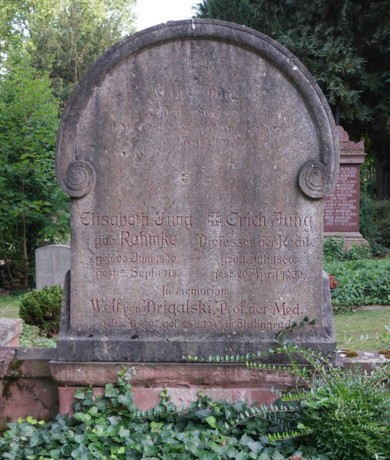 Epitaph für den Internisten Wolfgang von Drigalski, 1907-1943, auf dem Hauptfriedhof Mainz